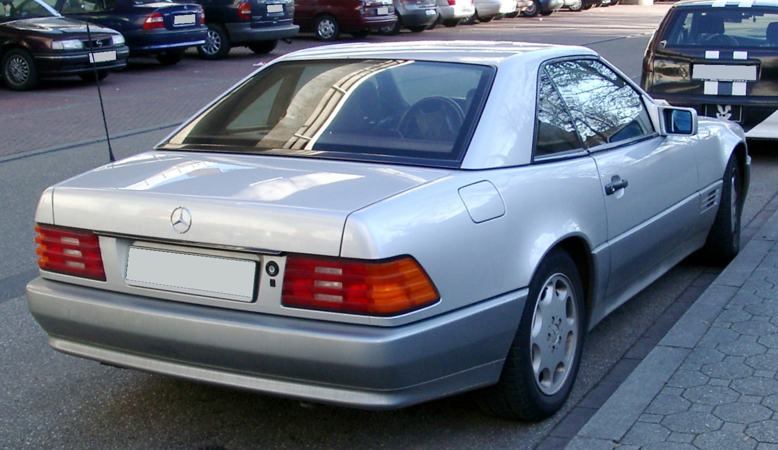 Mercedes-Benz R129